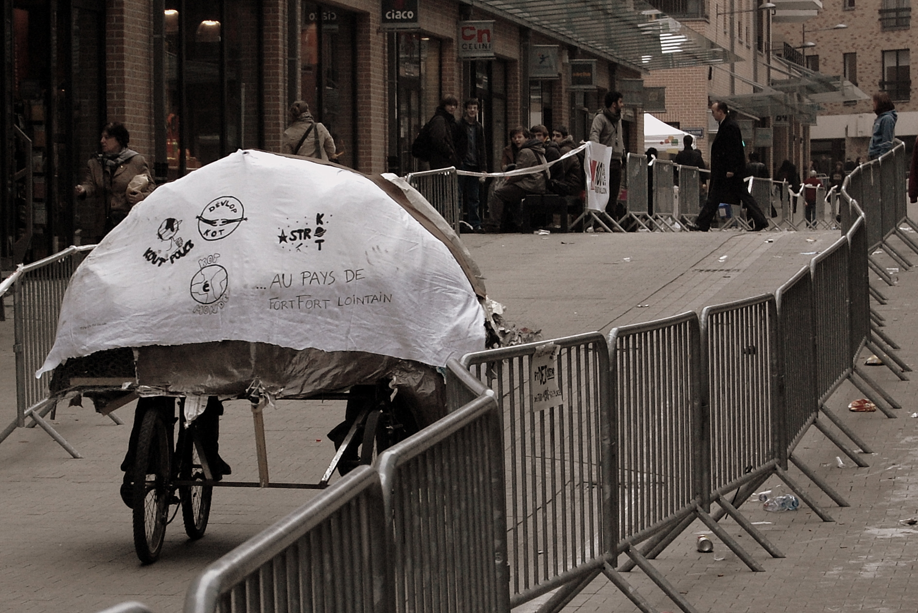 A fanciful bike float at 24h vélo de Louvain-la-Neuve